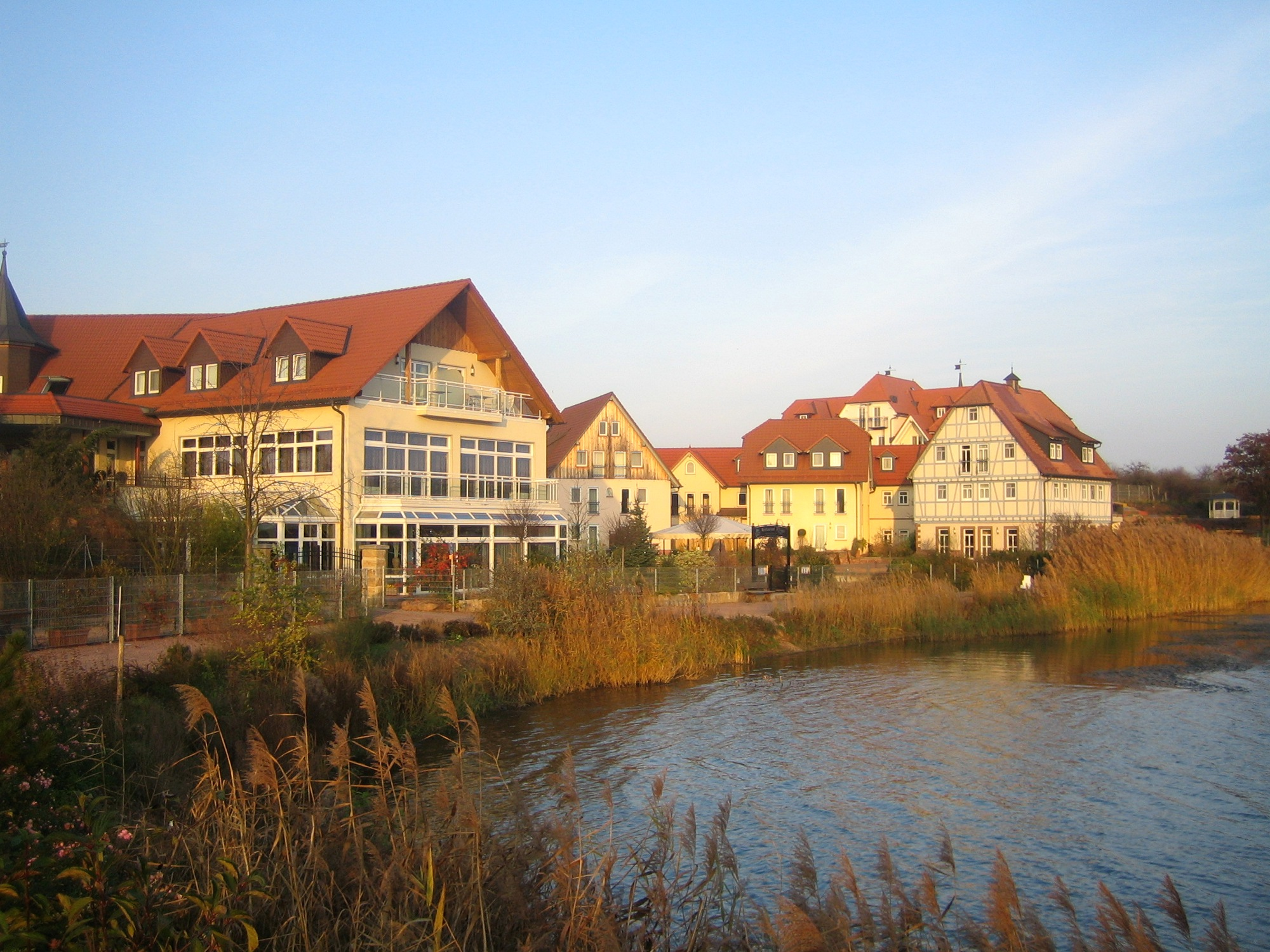 Das "Seehotel" in Niedernberg, Bayern, Deutschland